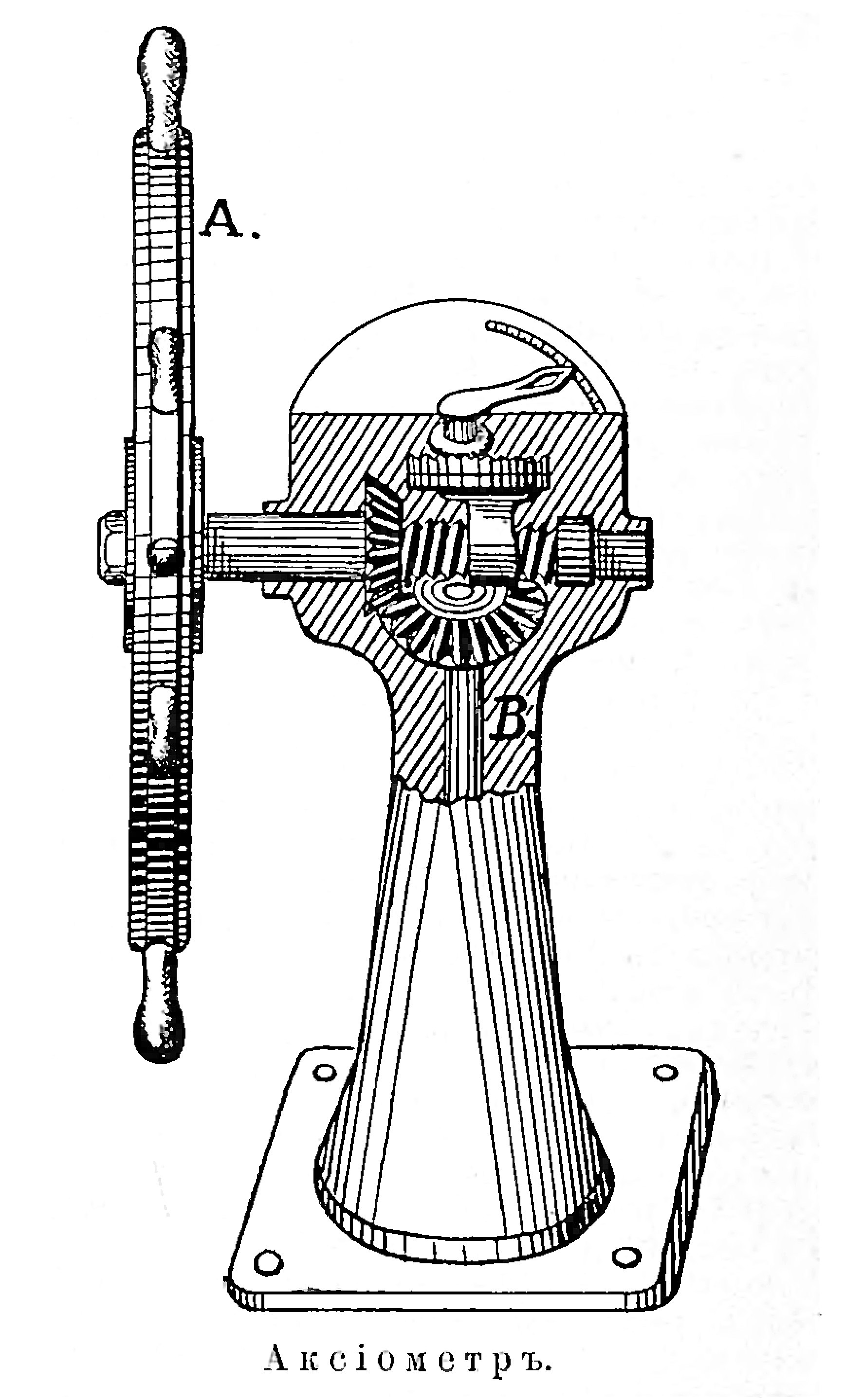 Изображение из «Военной энциклопедии» изданной книгоиздательским товариществом Ивана Дмитриевича Сытина. Санкт-Петербург; 1911—1915 гг. Фото к статье «Аксиометр».